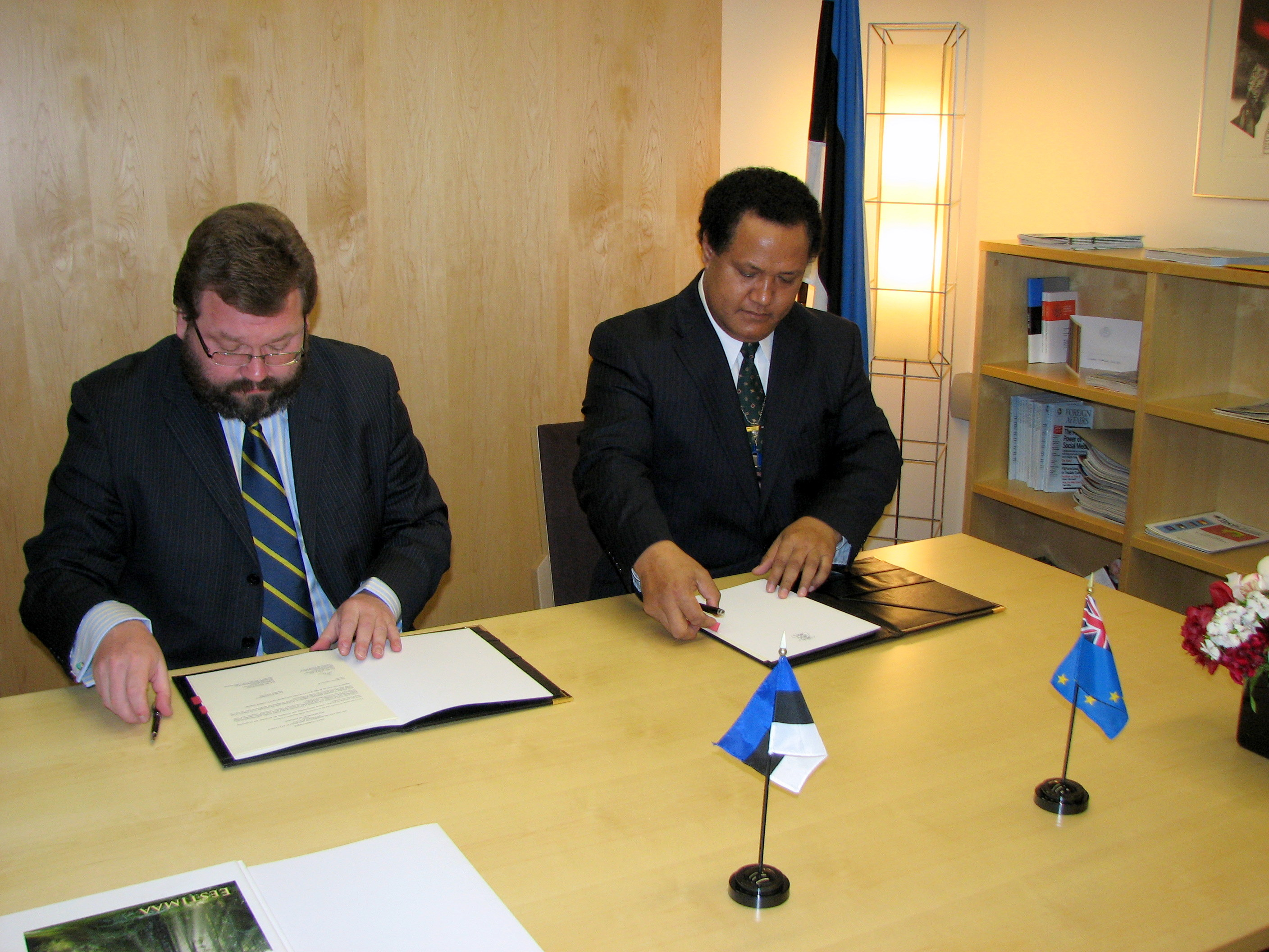 Eesti suursaadik ÜRO juures Margus Kolga sõlmis Tuvalu suursaadikuga ÜRO juures Afelee F. Pitaga Eesti ja Tuvalu vahelised diplomaatilised suhted. 25.05.2011